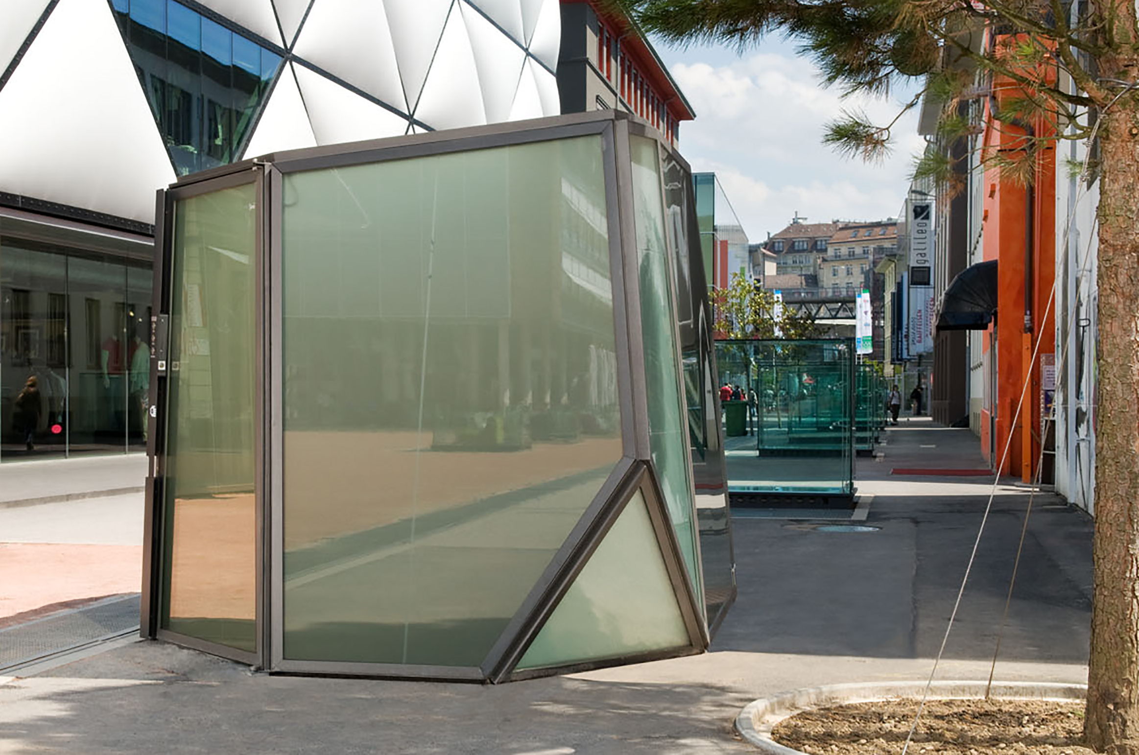 Structure avec parois en cristaux liquides